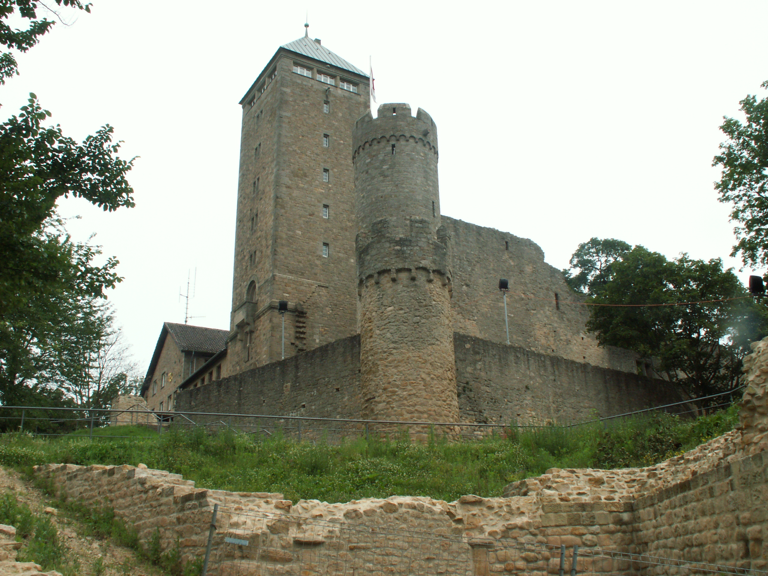 Der Planetenweg in Heppenheim. Von Heppenheim zur Sternwarte und Starkenburg. Weiter Informationen unter: Planetenweg und Starkenburg Heppenheim